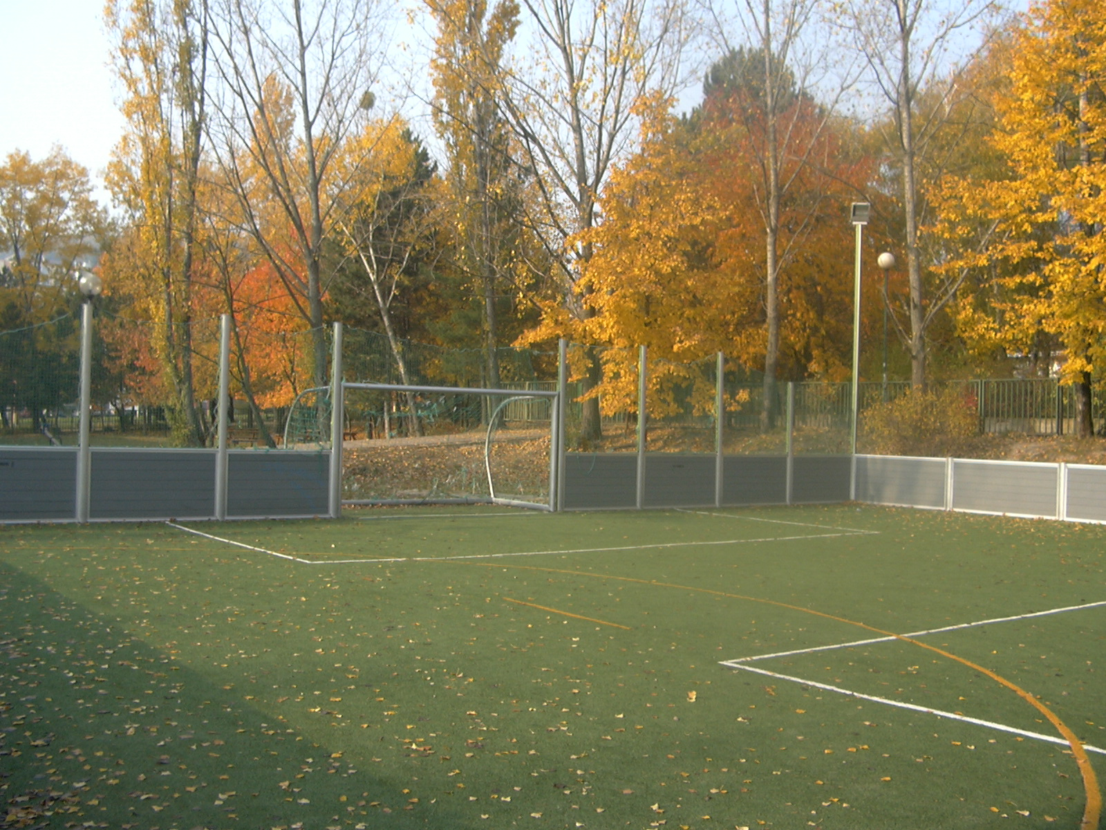 Futbalové ihrisko s umelou trávou v areály Spojenej školy sv. Františka z Assisi v bratislavskej mestskej časti Karlova Ves